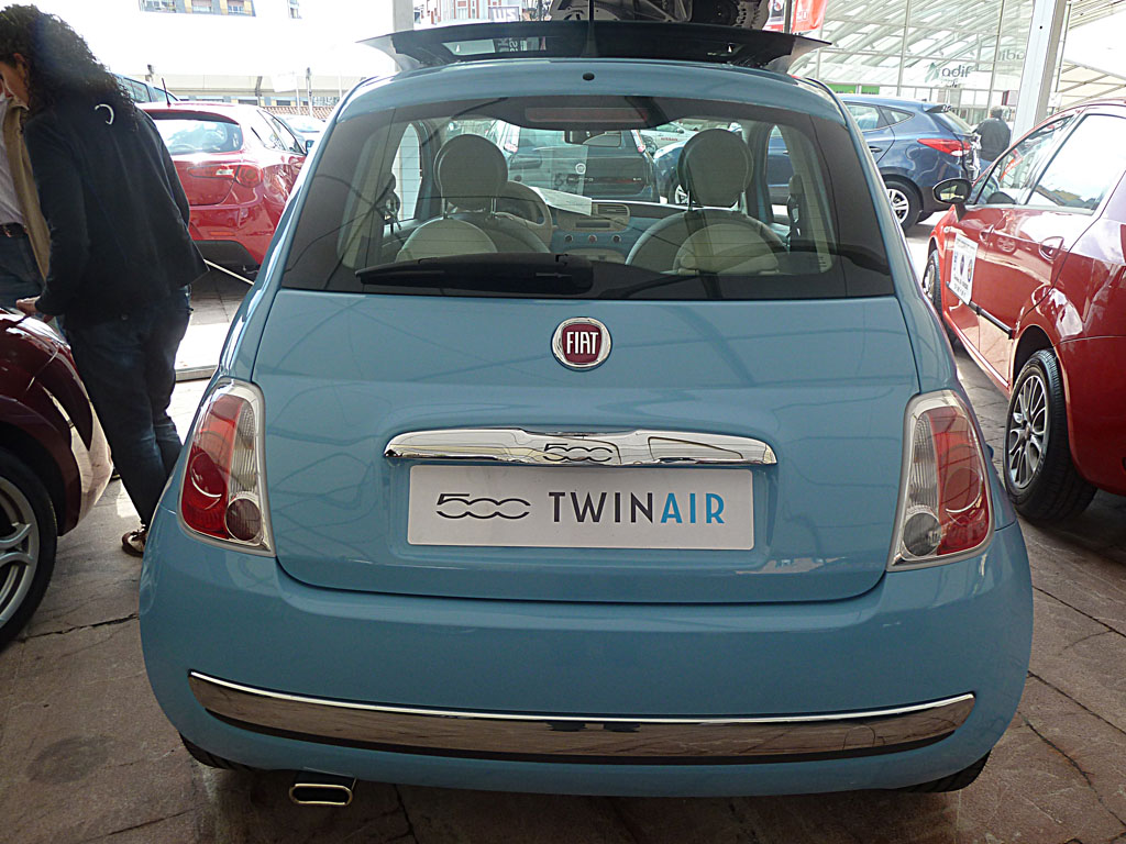 Italy